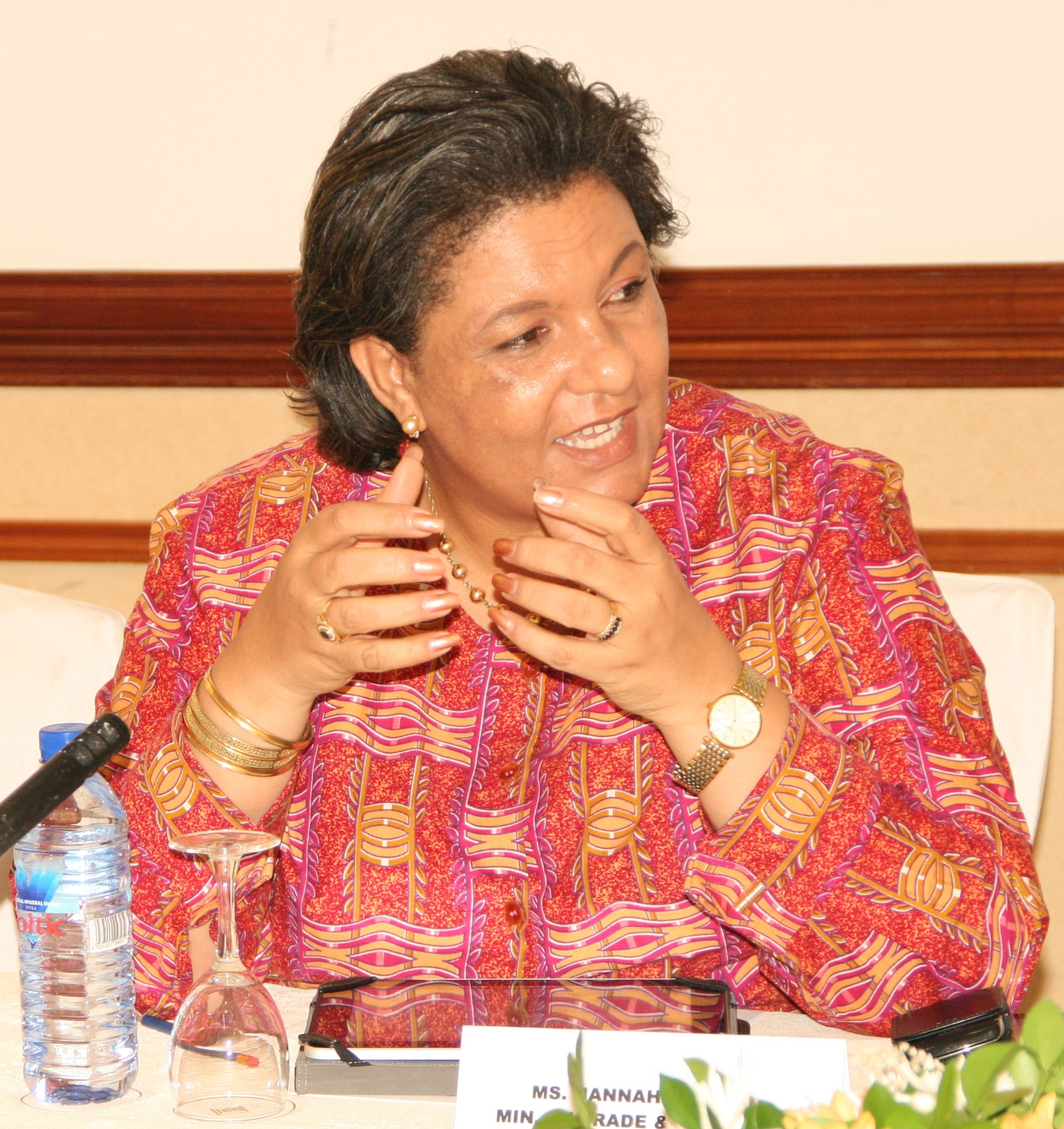 Ms. Hannah Tetteh, Minister of Trade and Industry